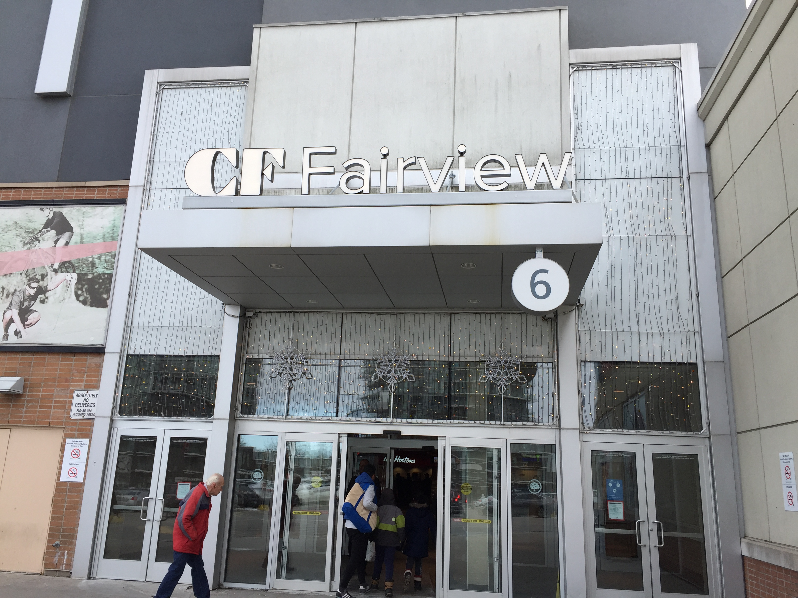 کوردی: شاباژێری فێرڤیو مۆڵ لە تۆرەنتۆ